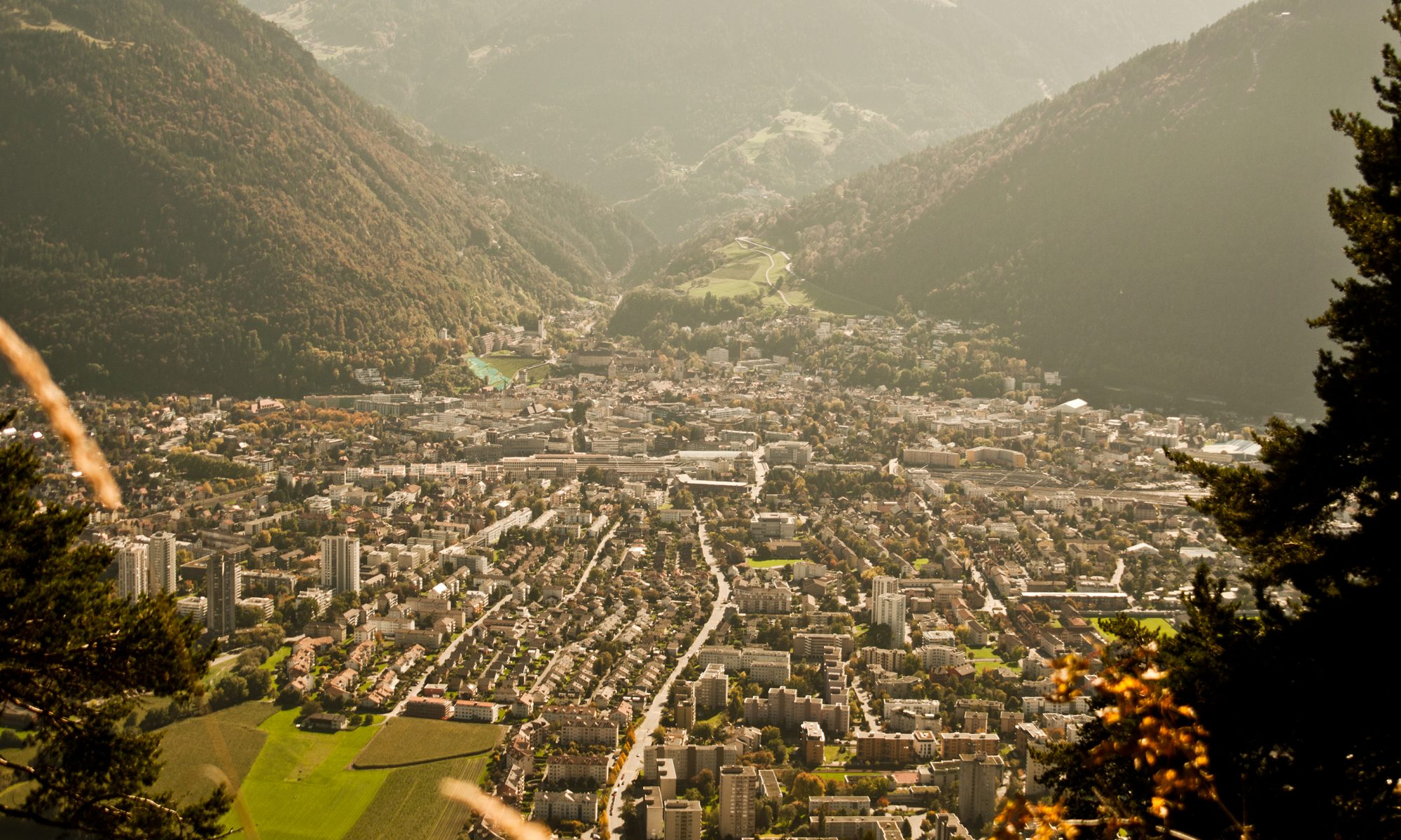 Blick auf Chur vom Hausberg Calanda.